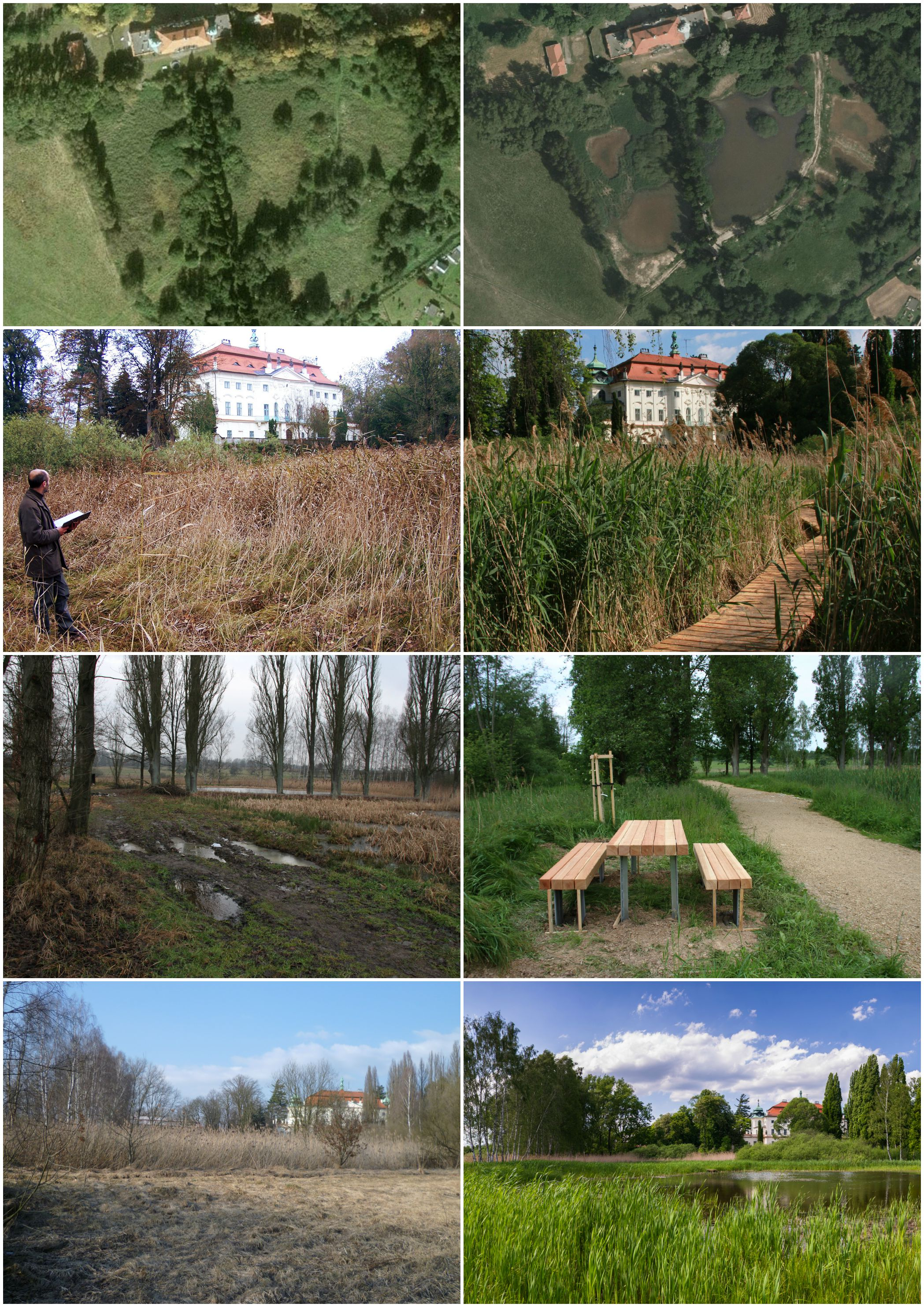 Mokřady Jablonné před a po revitalizaci, kterou provedl Čmelák